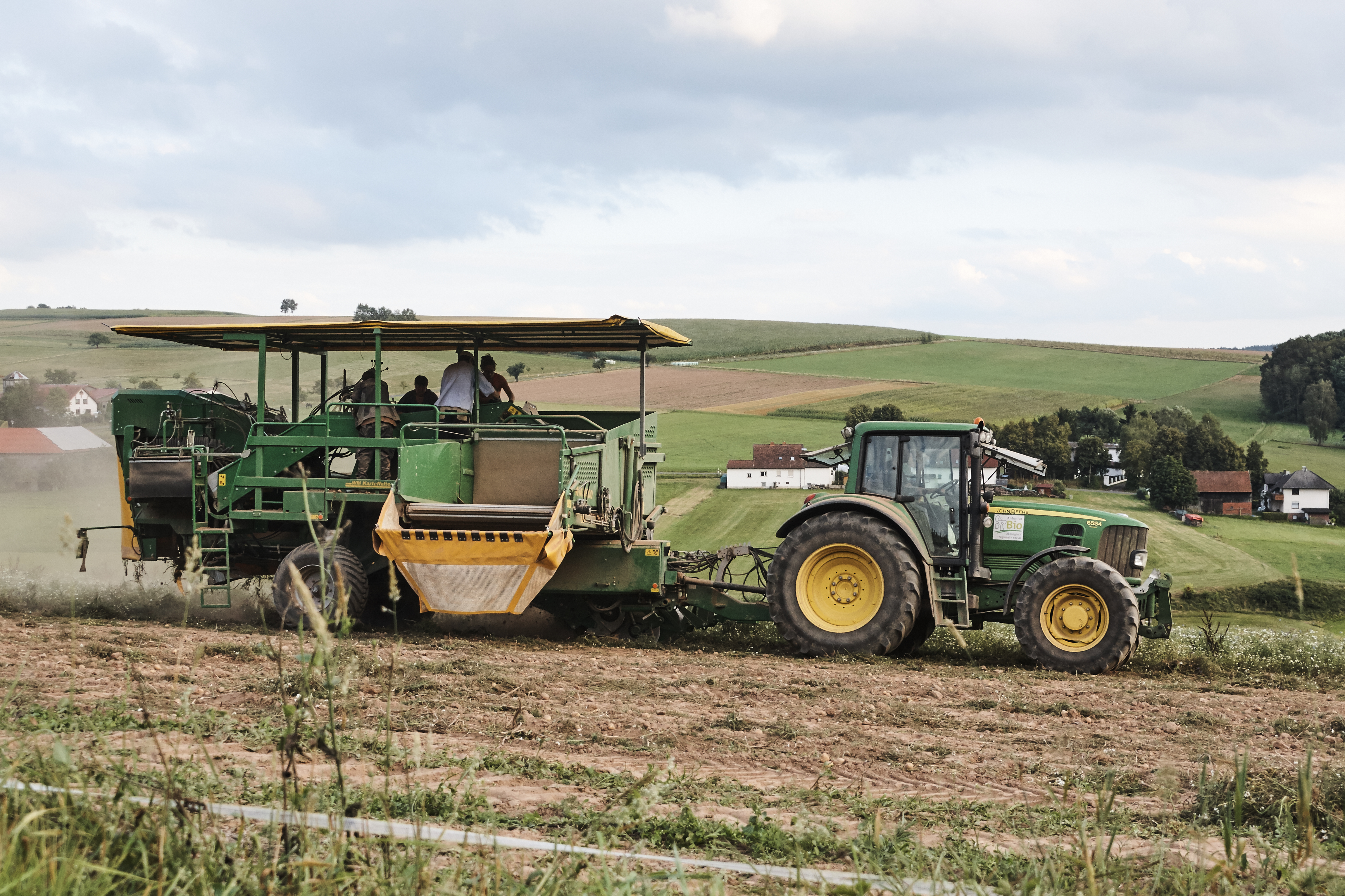 John Deere 6534 mit Kartoffelvollernter WM Kartoffeltechnik WM 4500 bei der Kartoffelernte im August 2016 in der Gemeinde Eichenzel im Landkreis Fulda am Rande der Rhön. Bewirtschaftet vom gemeinnützigen Antoniusheim, welches als biologisch produzierender Betrieb zertifiziert ist.